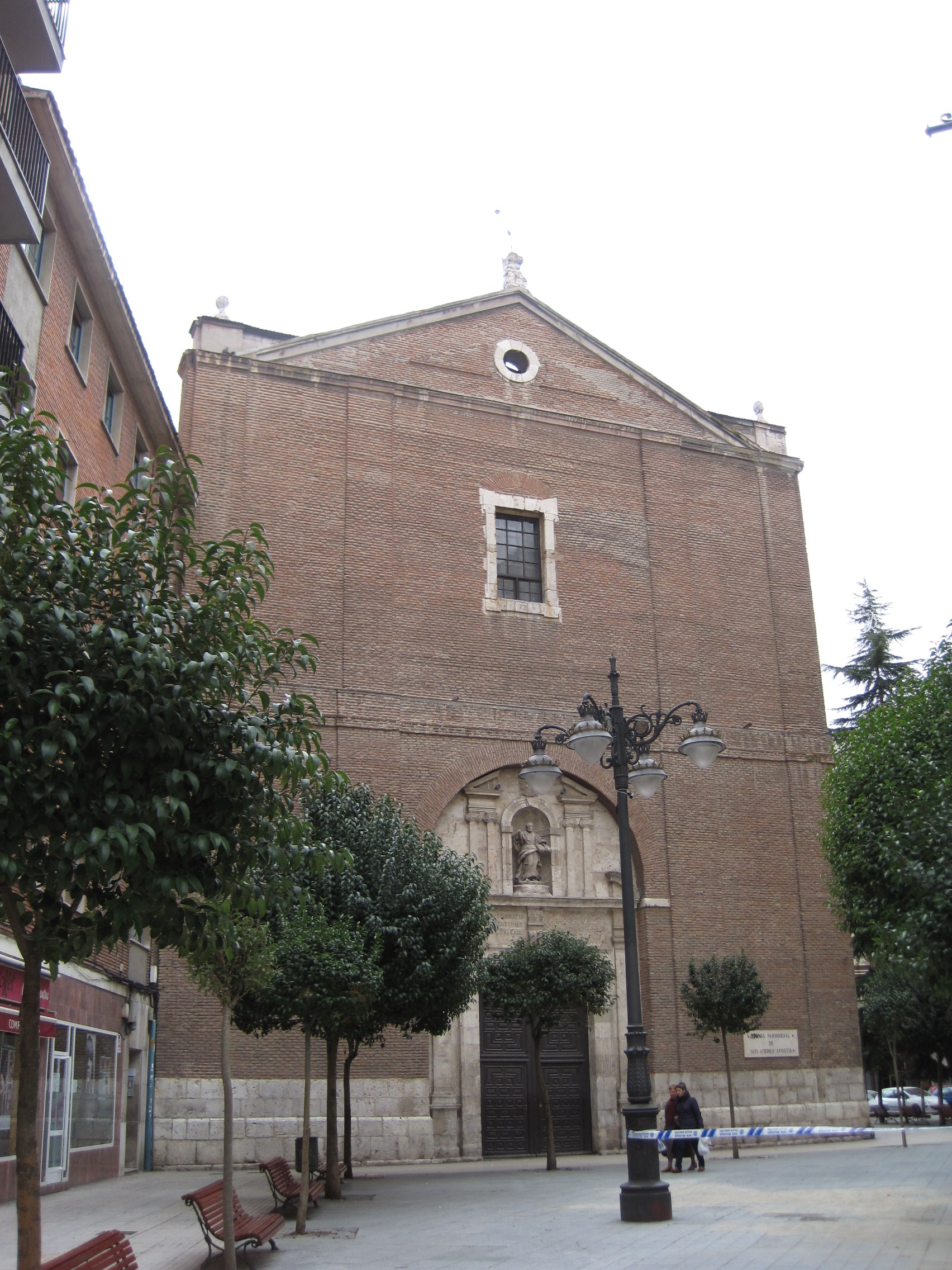 Fachada de la iglesia de San Andrés, Valladolid (España).